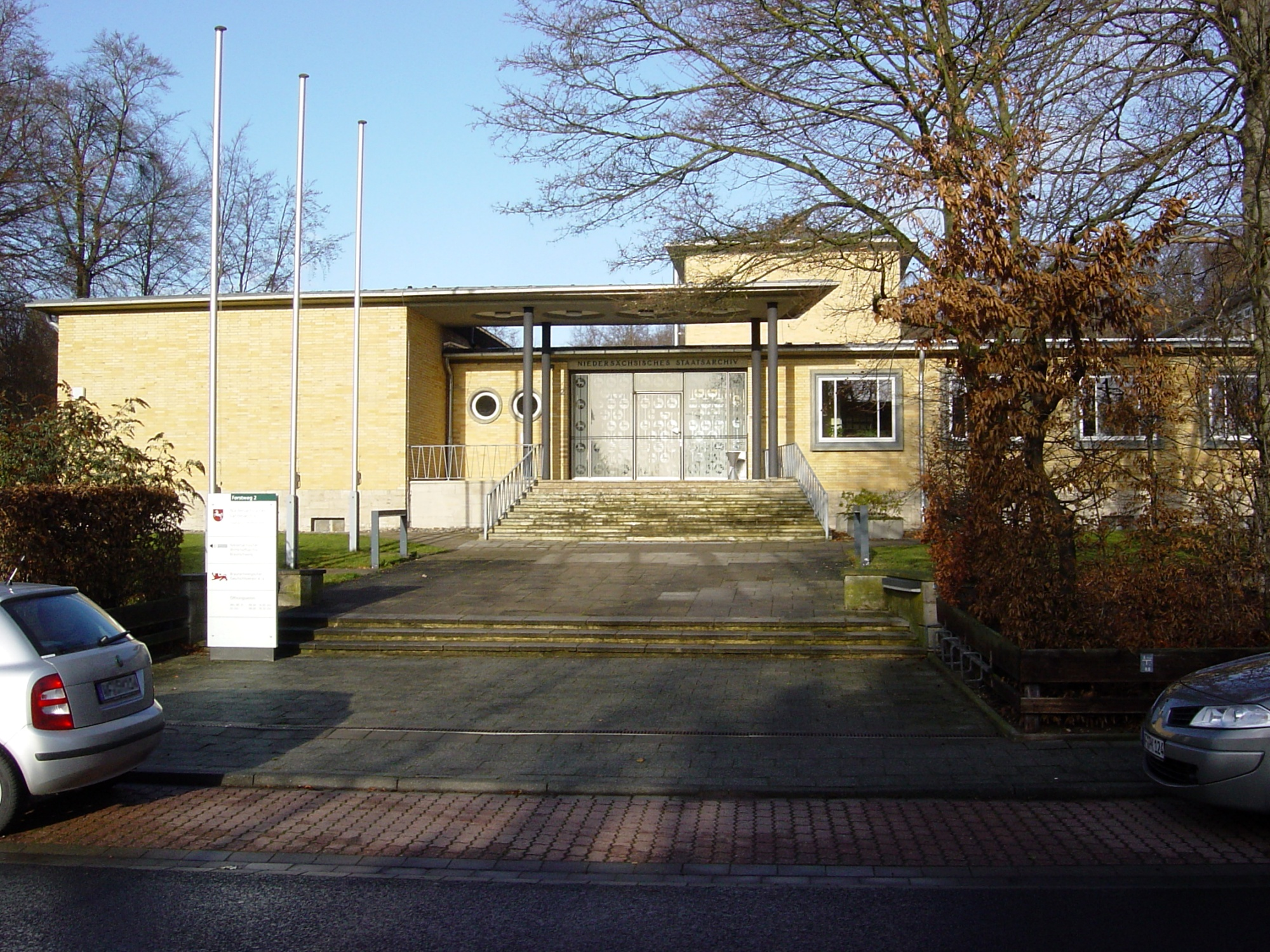 Niedersächsisches Landesarchiv - Staatsarchiv Wolfenbüttel, Forstweg 2, 38302 Wolfenbüttel